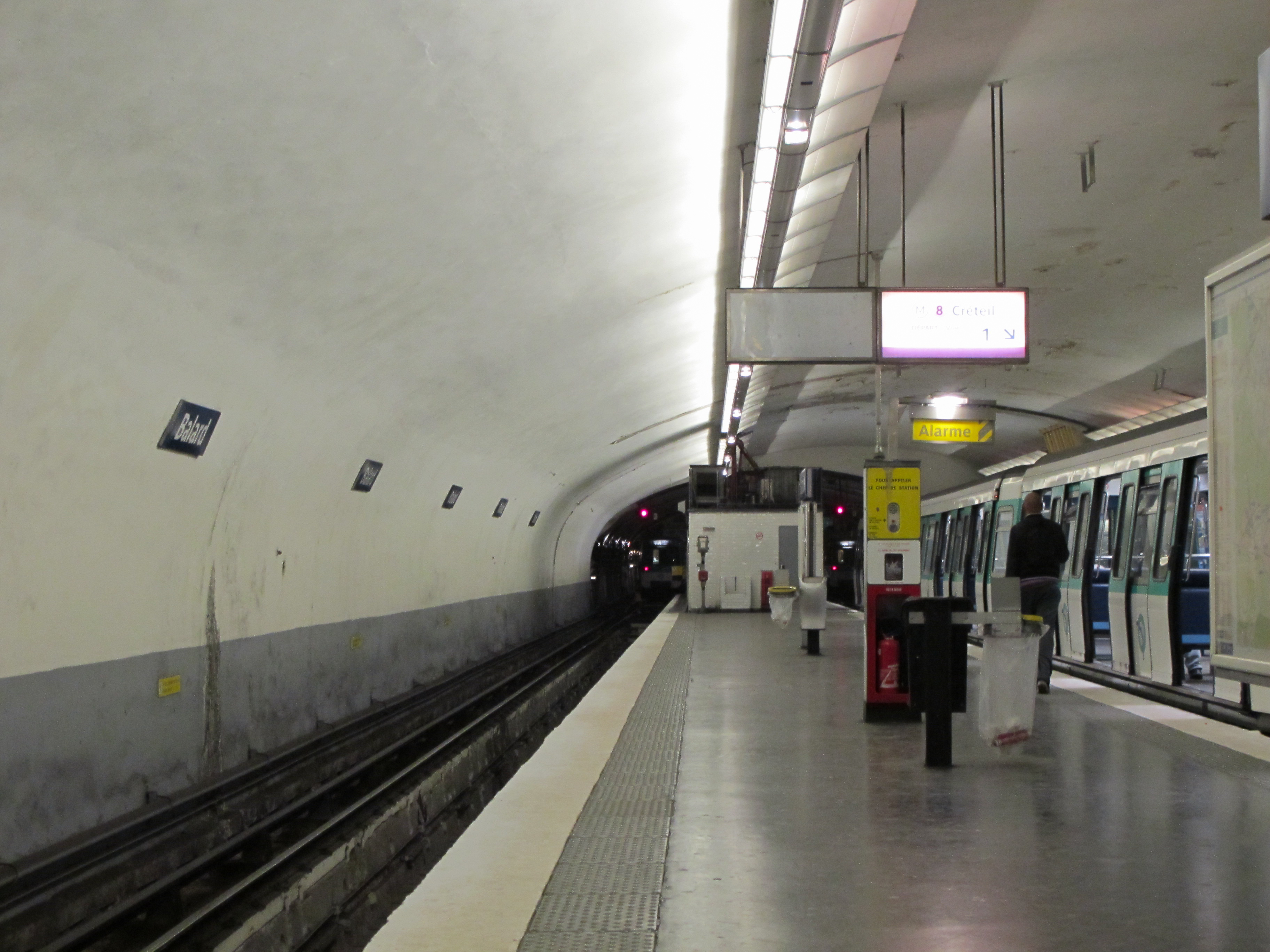 Station de métro Balard, ligne 8 du métro de Paris- Paris, France